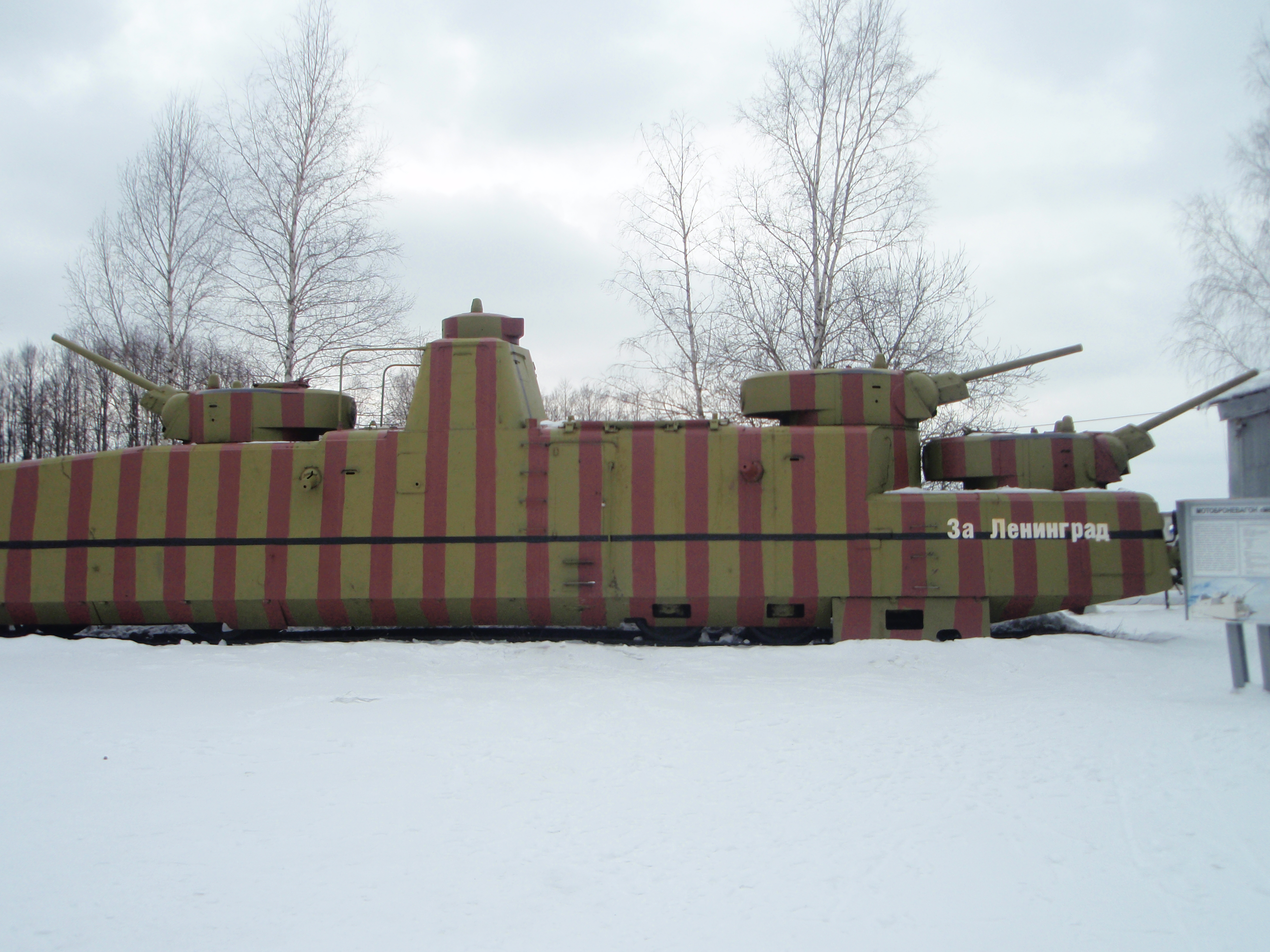 Советский Мотоброневагон МБВ времён ВОВ в Кубинке. Перевооружен пушками Ф-34